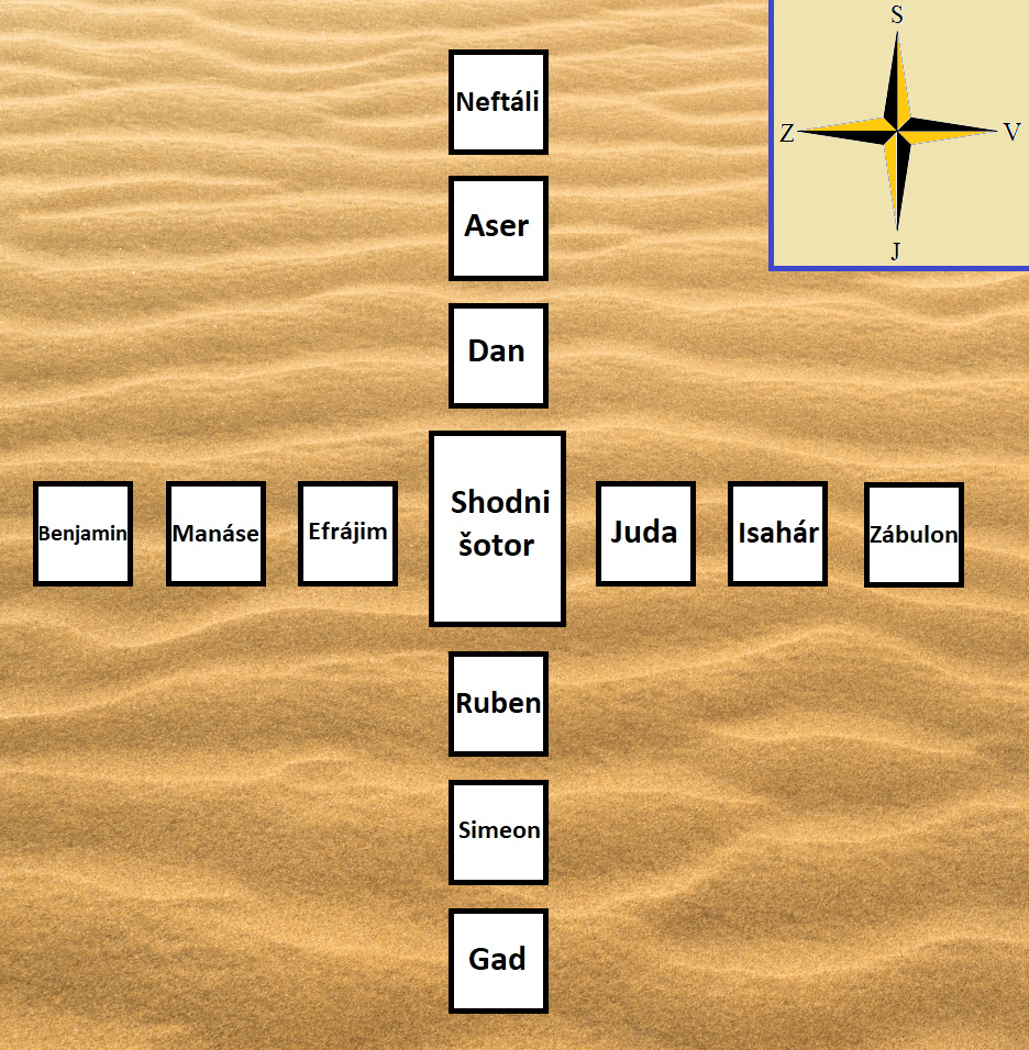 Domnevna postavitev Izraelovih taborov okoli shodnega šotora, kot to opisuje 4. Mojzesova knjiga.